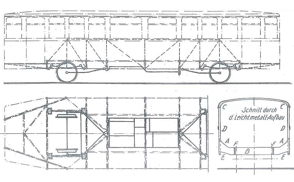 Prinzip der gekuppelten Vereinslenkachse bei dem HBE T1